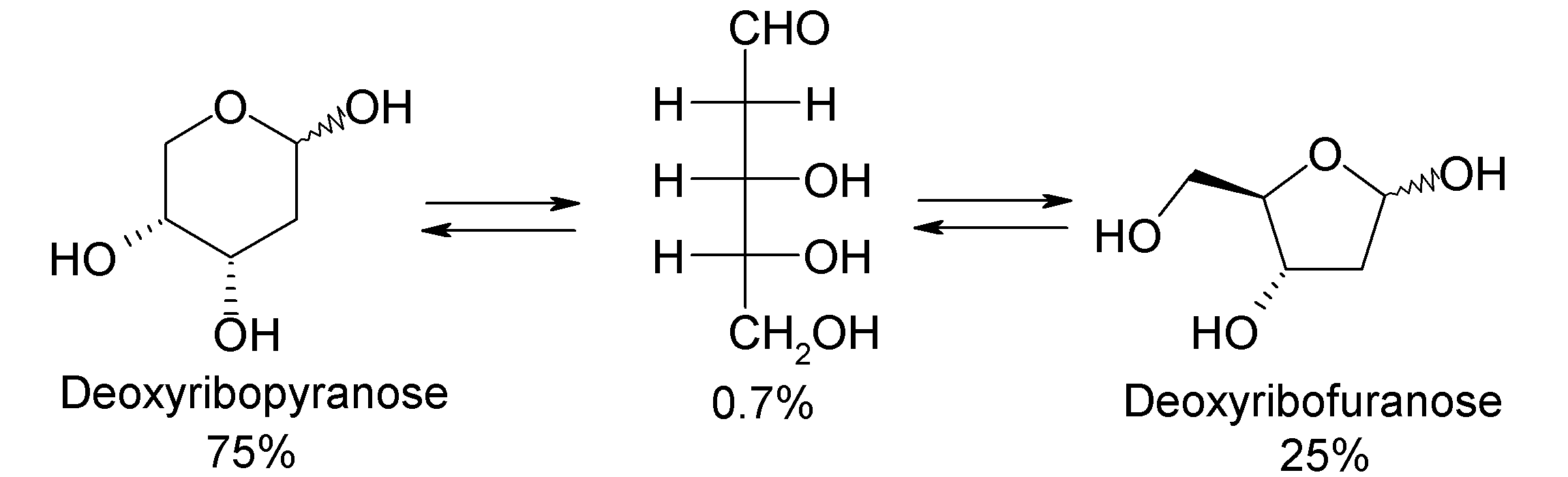 Akane700作成。デオキシリボースの平衡。